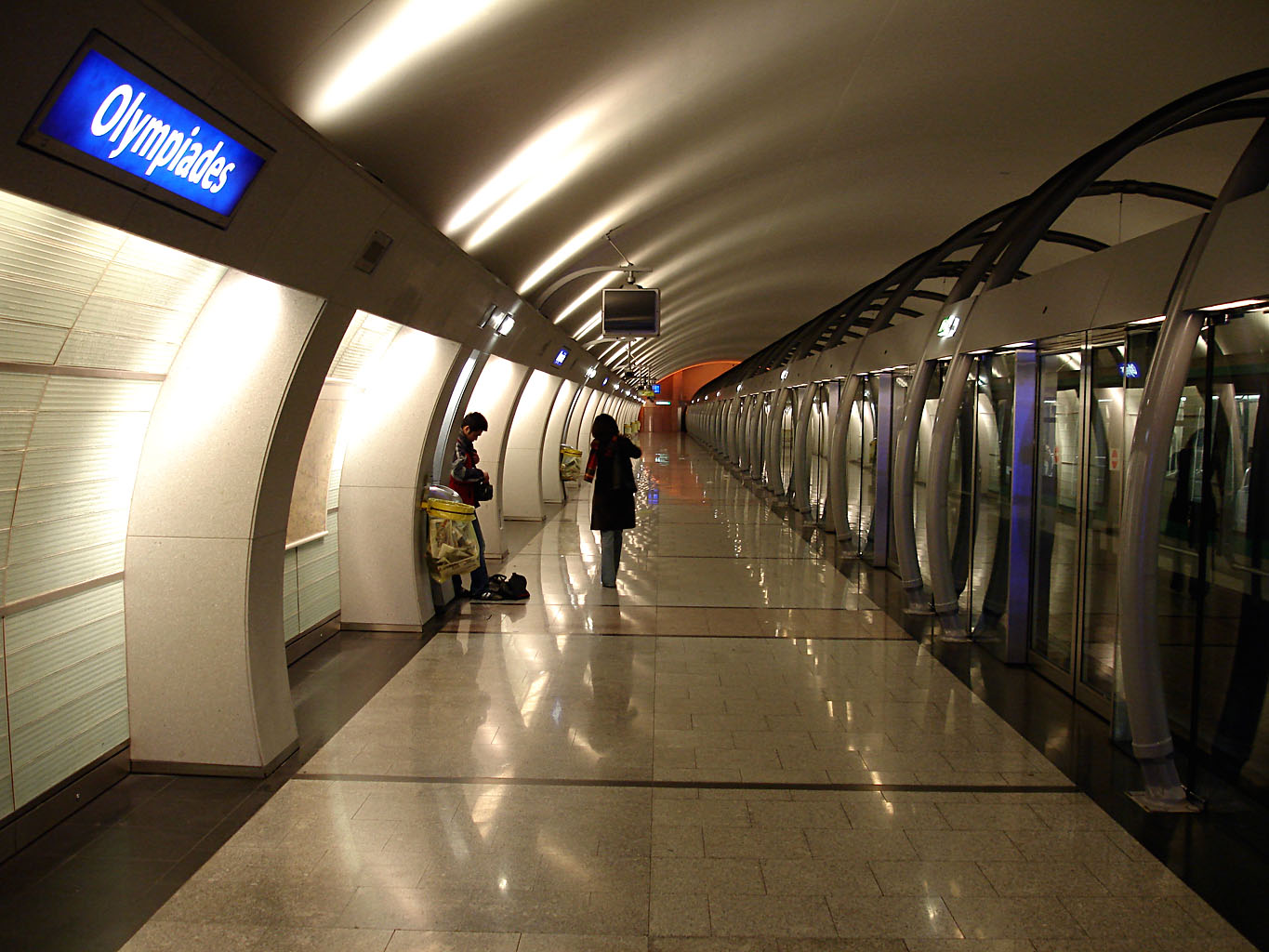 La station Olympiades de la ligne 14 du métro de Paris, France